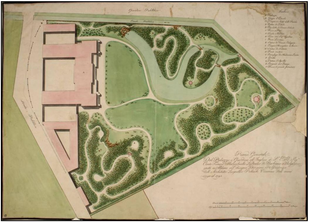 AUTORE: Leopoldo Pollach TITOLO: Piano Generale / Del Palazzo e Giardino all‟ Inglese di S.° E.° Il Sig.° / Conte Tenent Mareschiallo Ludovico di Barbiano e Belgiojoso. / eretti in Milano col disegno Direzione ed Asistenza / dell Architetto Leopoldo Pollach Viennese dall anno / 1790 al 1793 DATA: 1790 - 1793 COLLOCAZIONE: Milano, Civica Raccolta delle Stampe “A. Bertarelli” TECNICA Tempera ed acquarello su carta patinata da disegno DIMENSIONI: 490 x 700